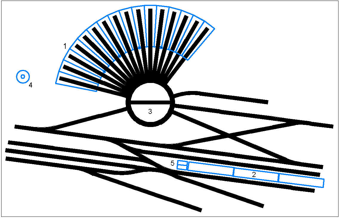 Grafik des Bw Dillenburg um 1915